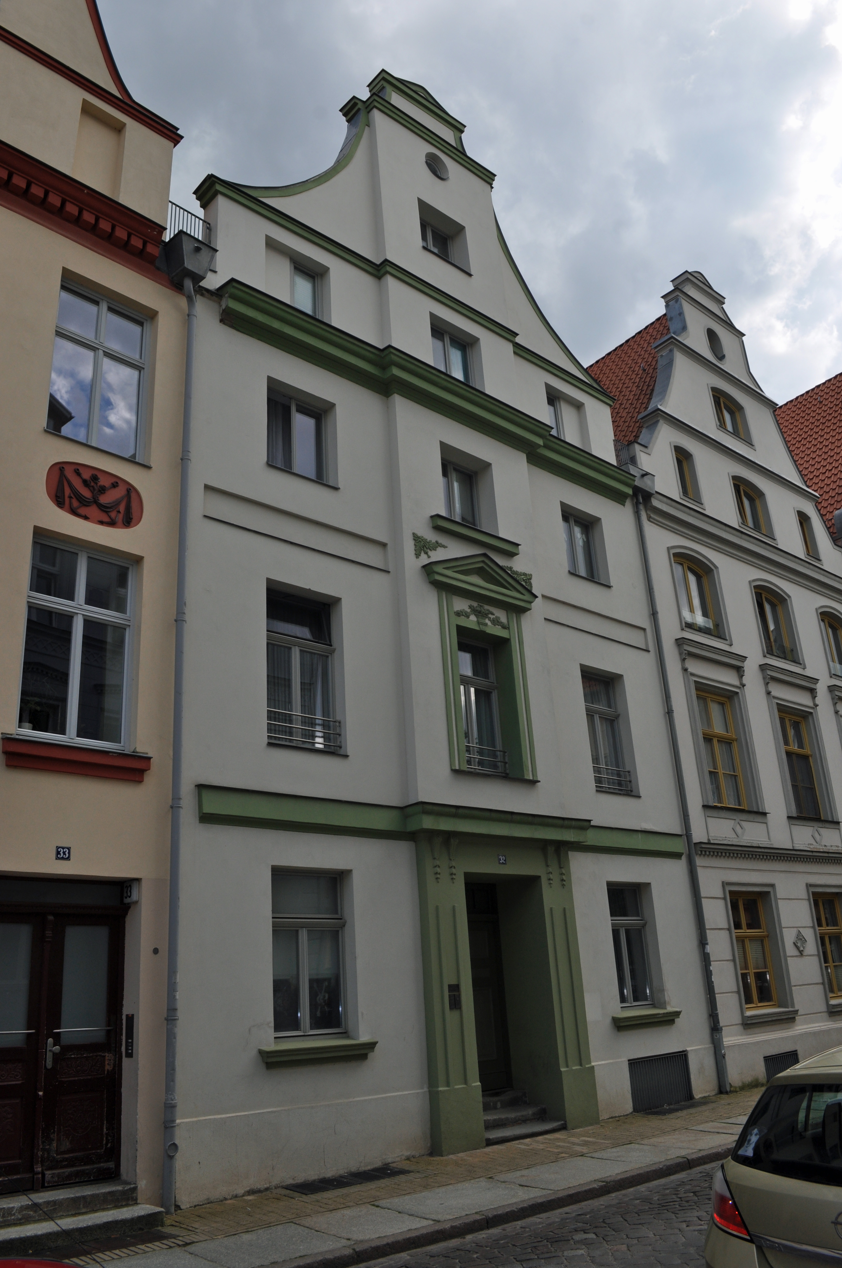 Das Foto zeigt ein Haus (bzw. Details des Hauses) in der Frankenstraße in Stralsund, Deutschland. Die Hausnummer steht im Dateinamen. Aufgenommen am 19. Juli 2011 vom Benutzer:Klugschnacker.